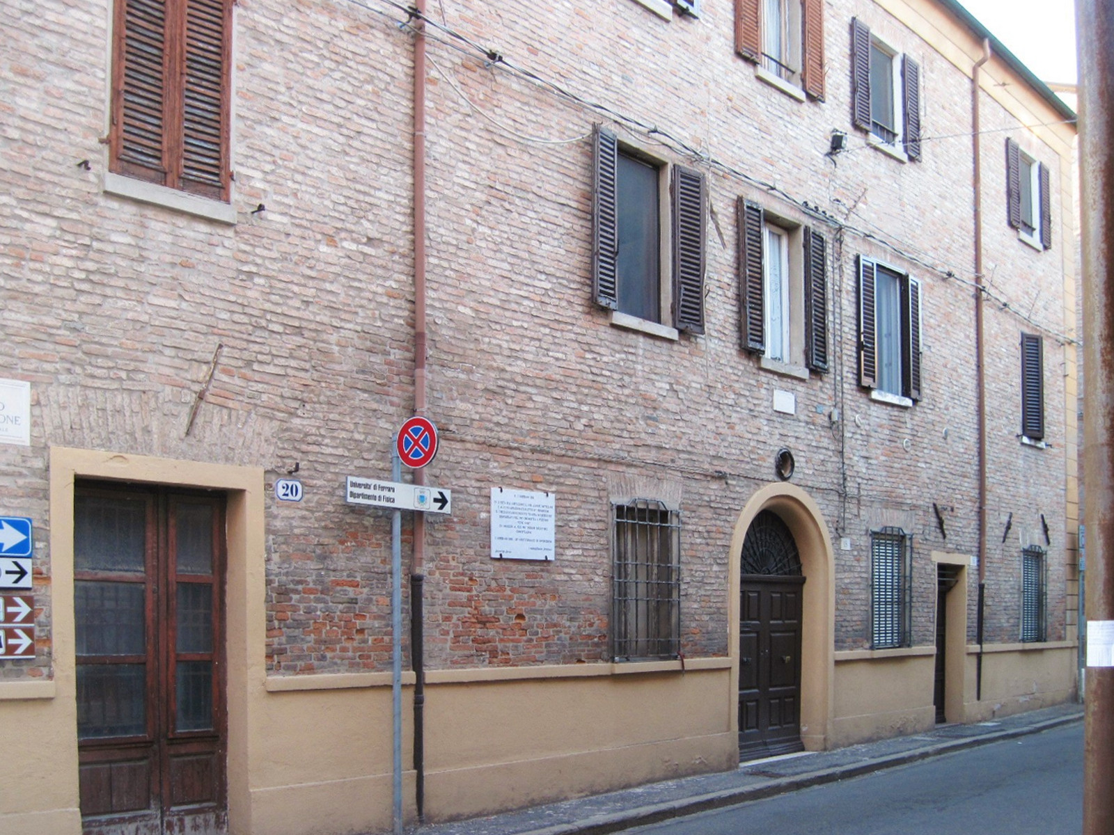 Via del nucleo medievale della città di Ferrara